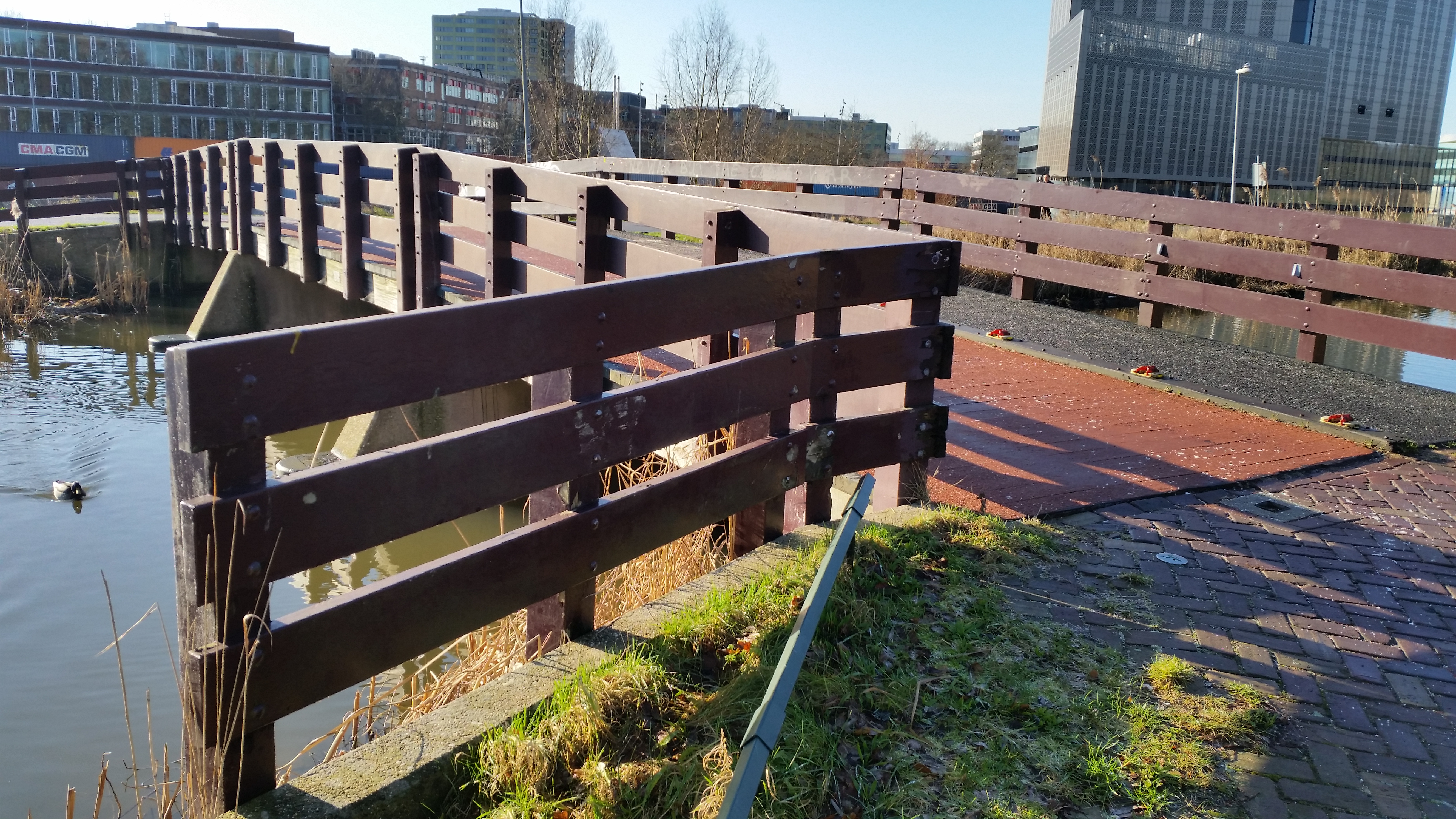 Overzicht van Brug 195, Henrietta Leavittbrug richting Sciencepark